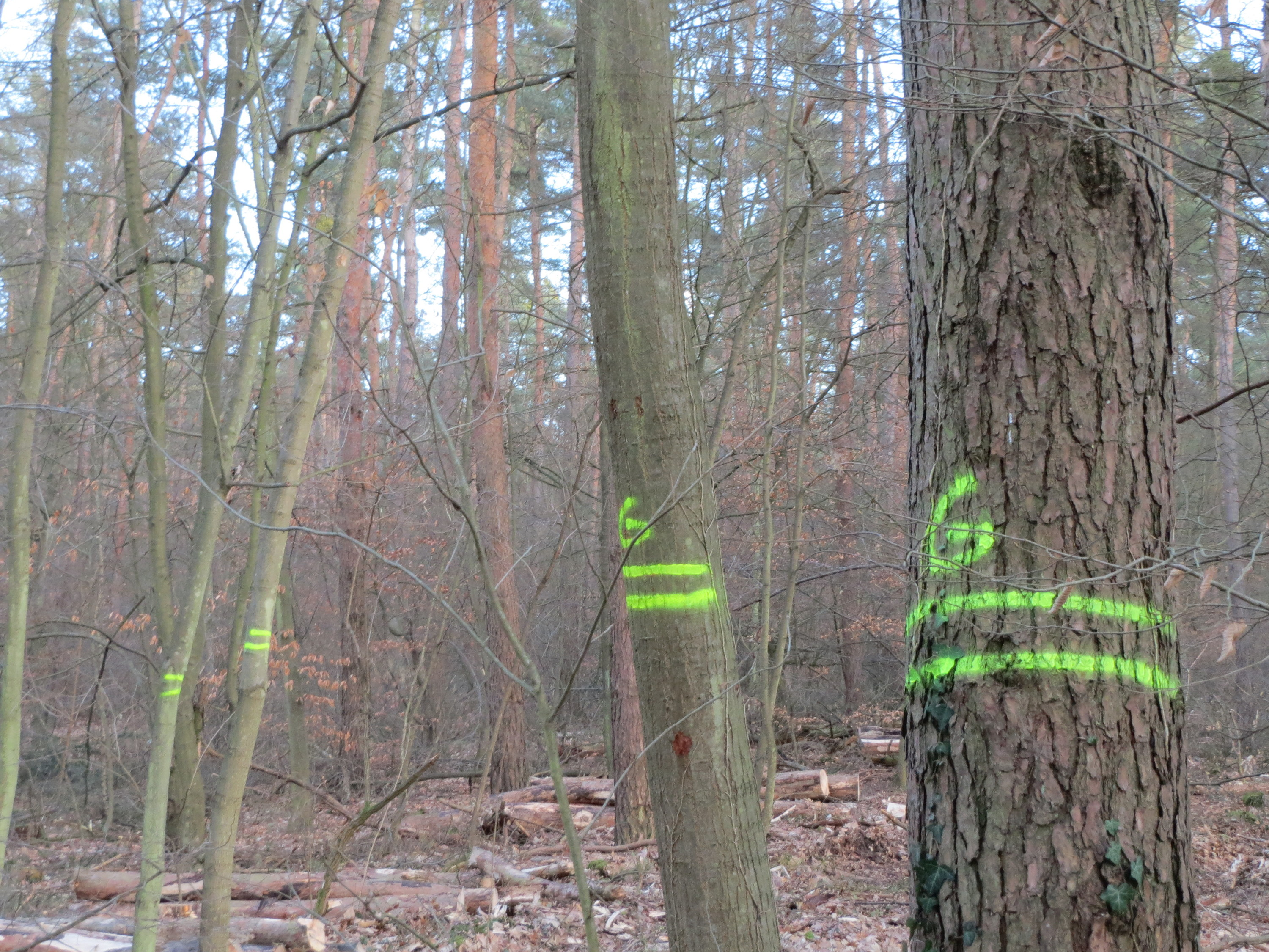 Baummarkierungen in der Unteren Lußhart bei Neulußheim (Gemarkung Altlußheim)